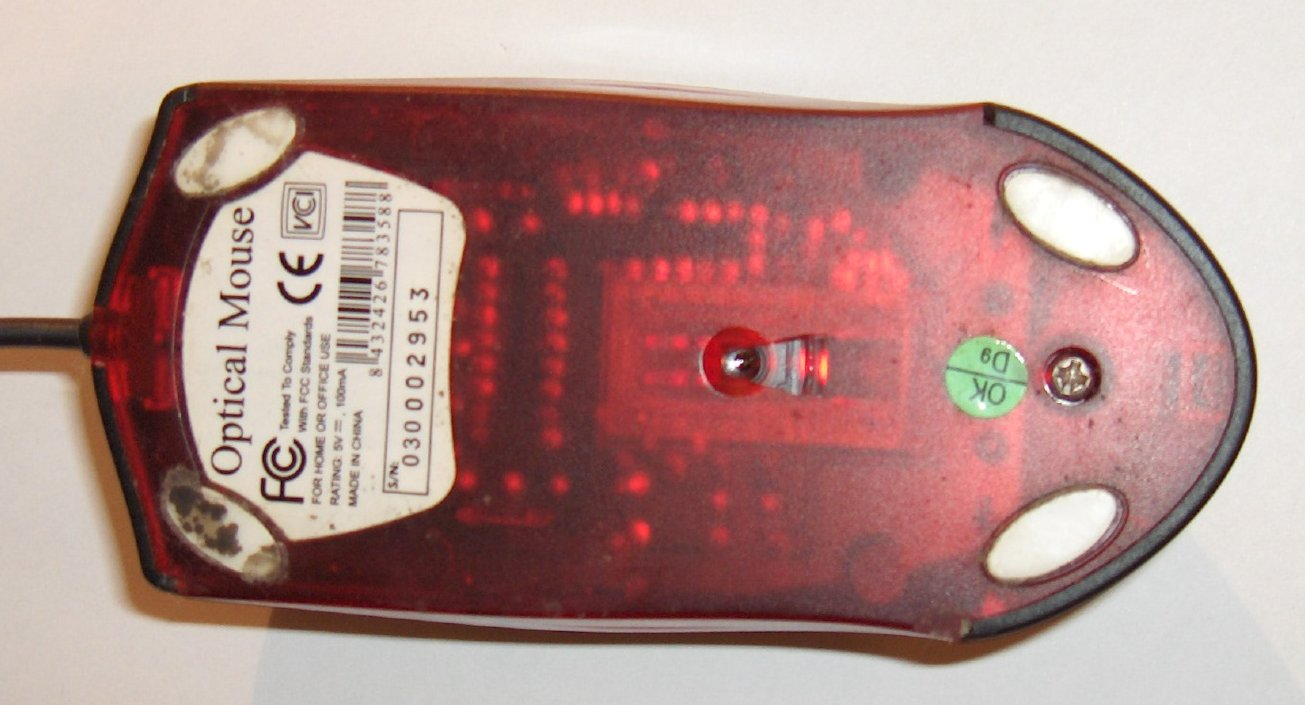 Ratón óptico Foto tomada por Jorge González. Ratón